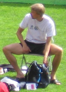 Johan Meriluoto Kalevan kisoissa, Ratinan stadionilla, Tampereella, 26. heinäkuuta 2008